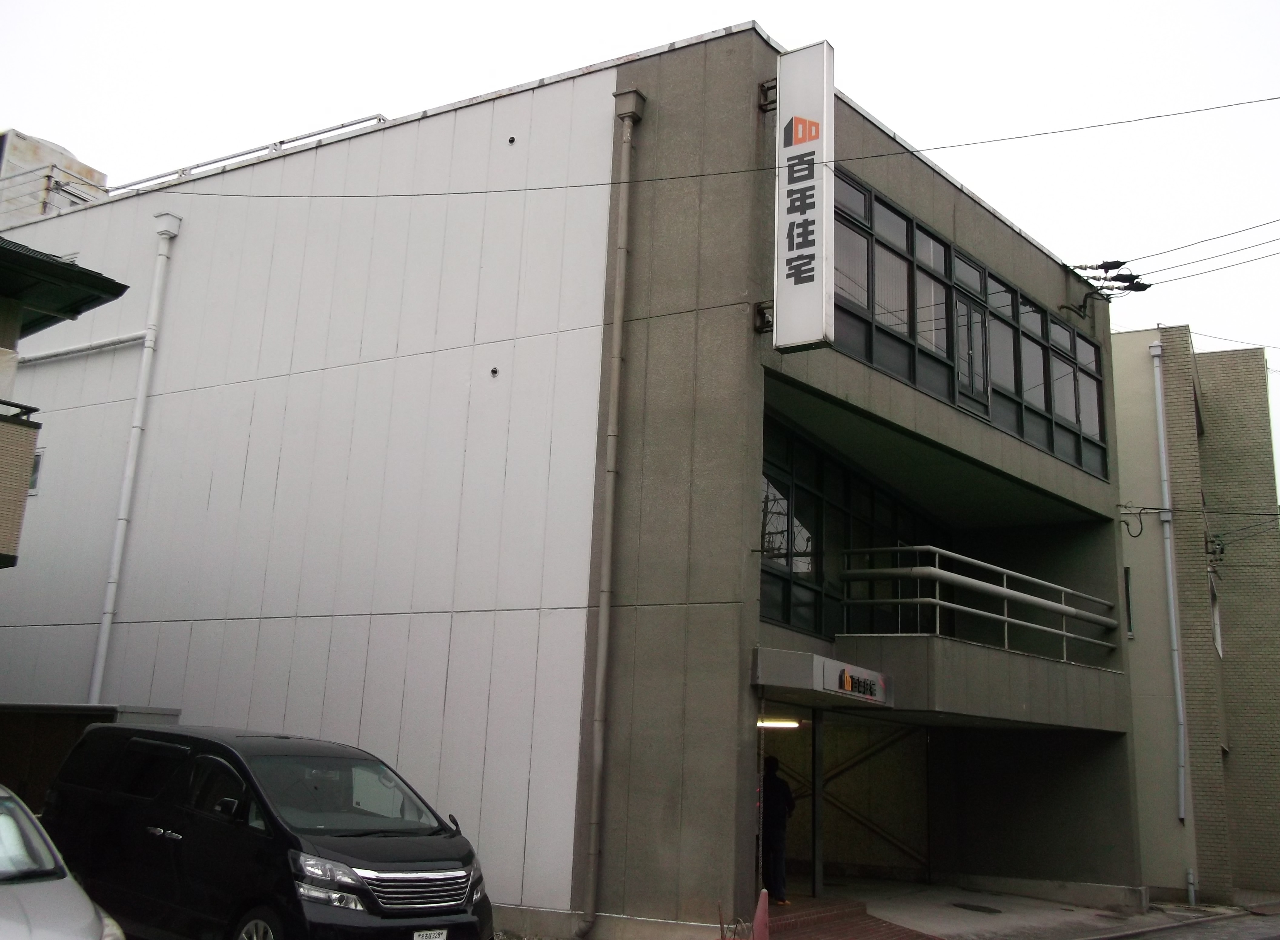 名古屋市中川区の百年住宅中部 本社を南側公道西側より撮影